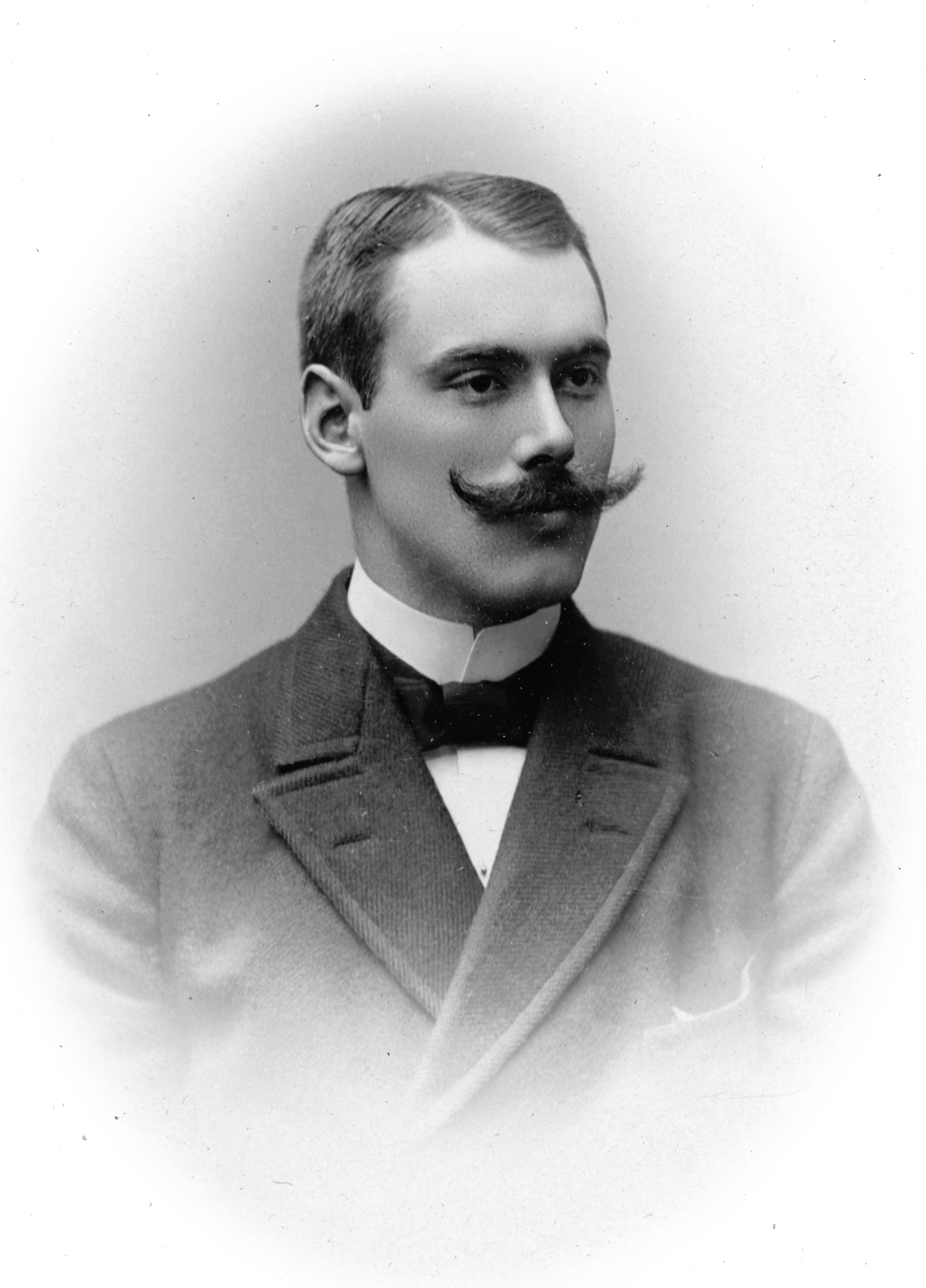 John Forsell, sångare vid Kungliga Operan 1897